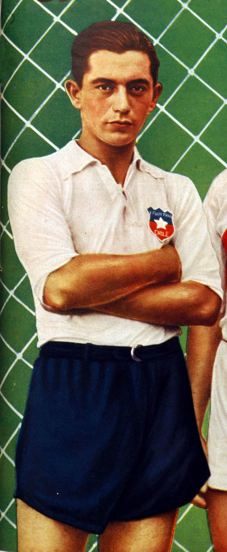 Raúl Toro (Chile) y Lolo Fernández (Perú). Original caption: RAUL TORO y LOLO FERNANDEZ, CENTRE - FORWARDS DE CHILE Y PERU EN EL CAMPEONATO SUDAMERICANO DE FUTBOL